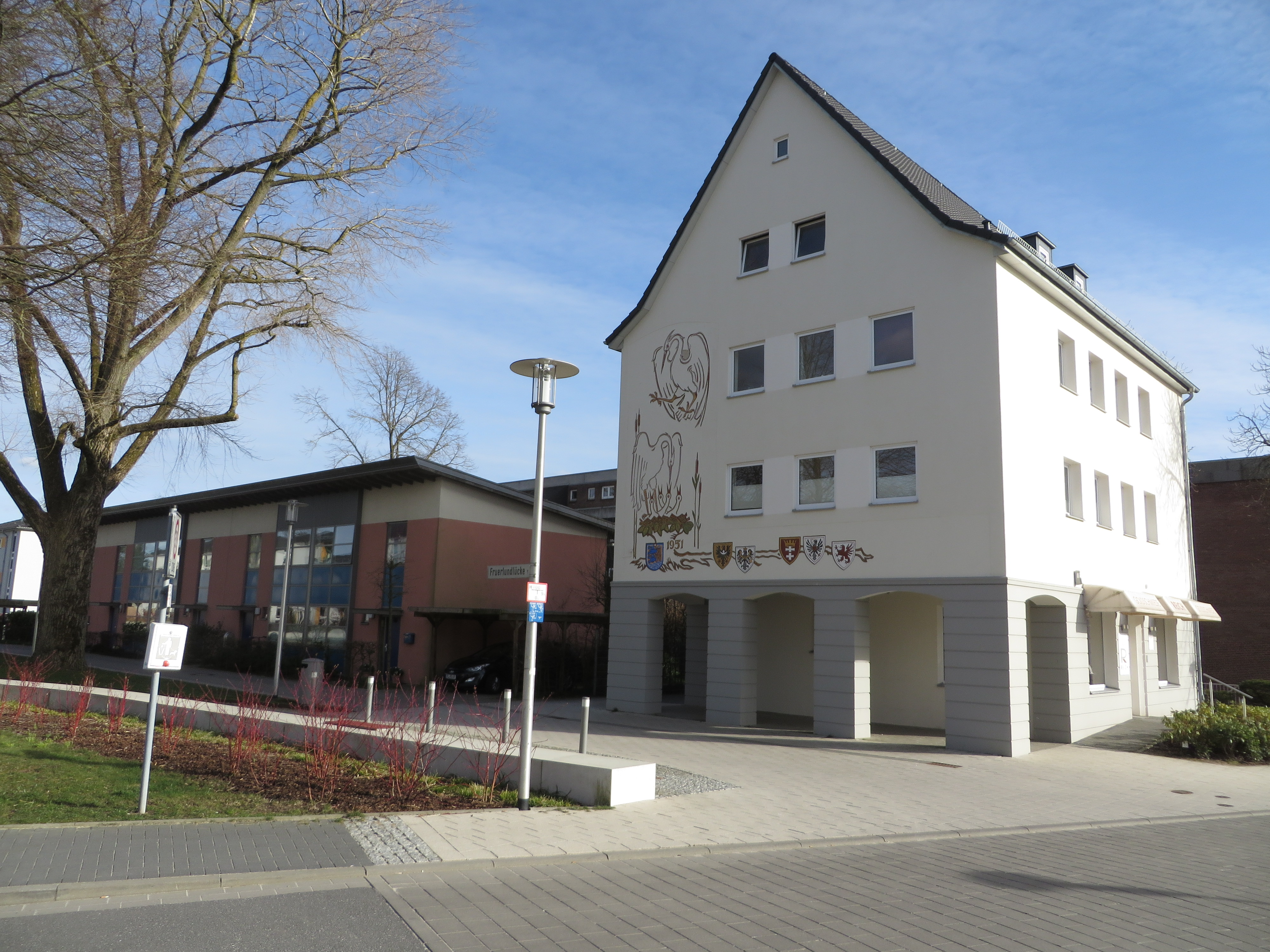 Turm-Haus am Nettelbeckplatz (Flüchteby-Flensburg, 5 April 2015), Bild 01